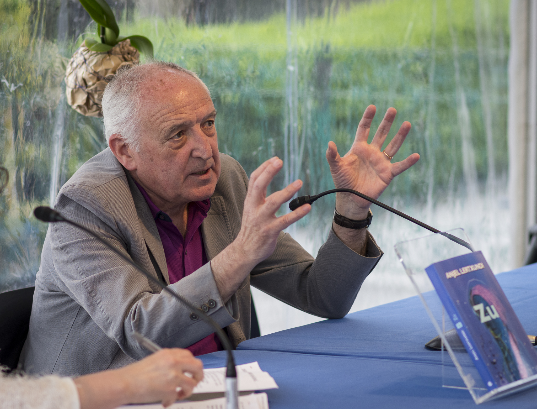 Anjel Lertxundi "Zu" liburuaren inguruko topaketan. Alderdi Eder Karpa. Donostia.Literaktum 2016